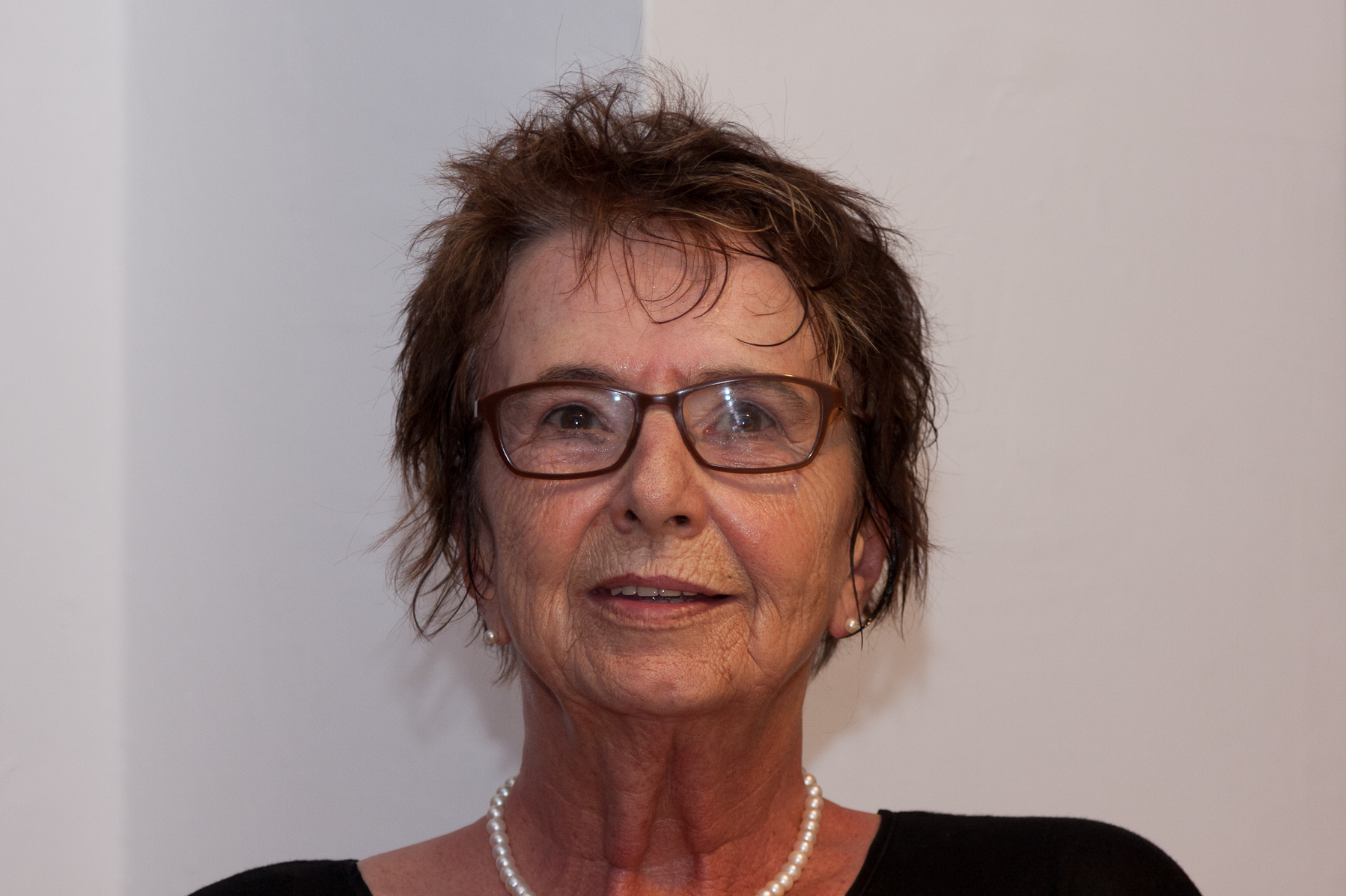 Miriam Pressler bei einer Lesung im Anne Frank Zentrum, 2012